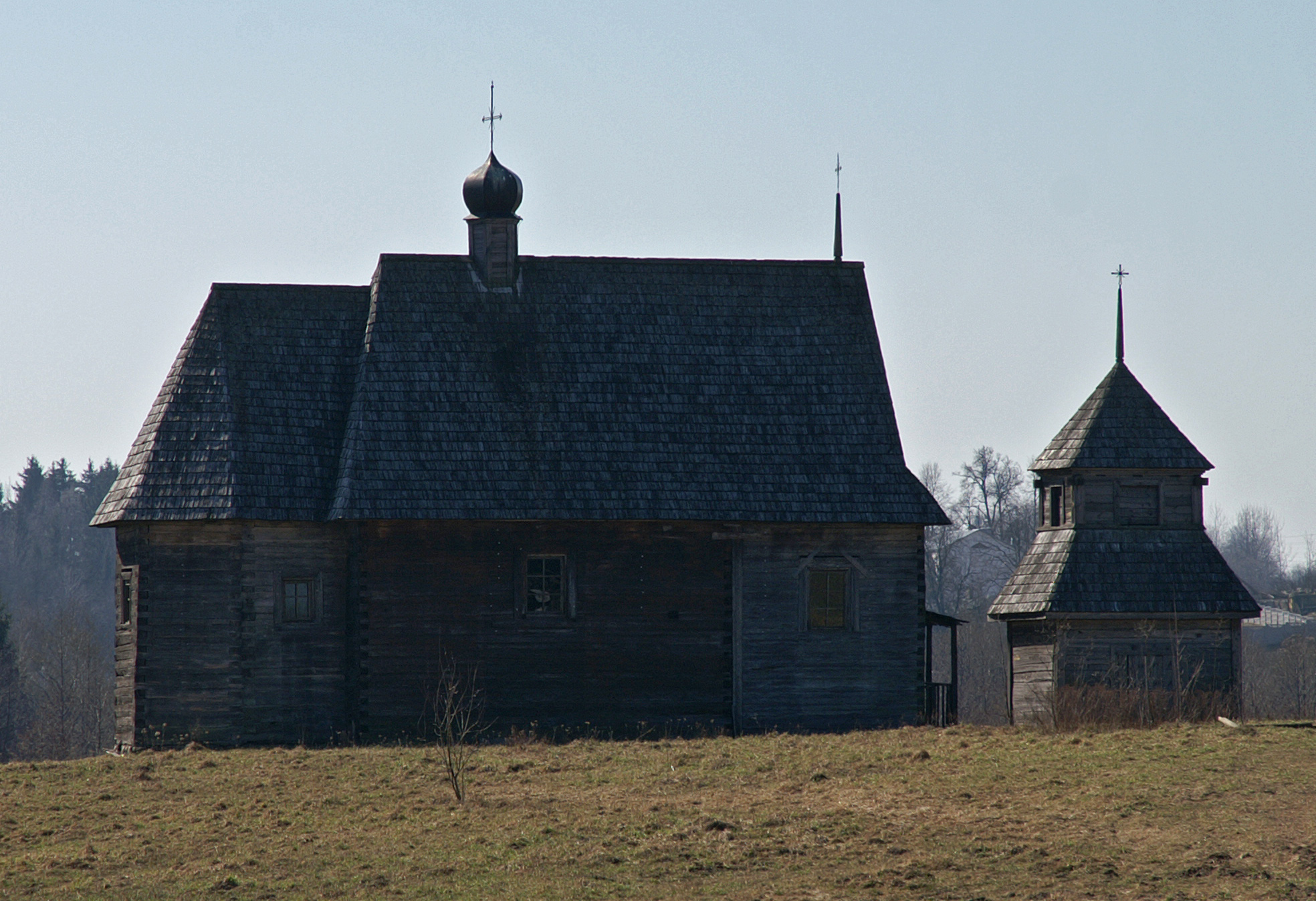 Беларуская (тарашкевіца): Макавееўская царква і званіца зь в. Вялец Глыбоцкага раёну Віцебскай вобласьці. в. Азярцо This is a photo of Belarusian heritage monument. Reference number: 612Г000399 ( WLM)